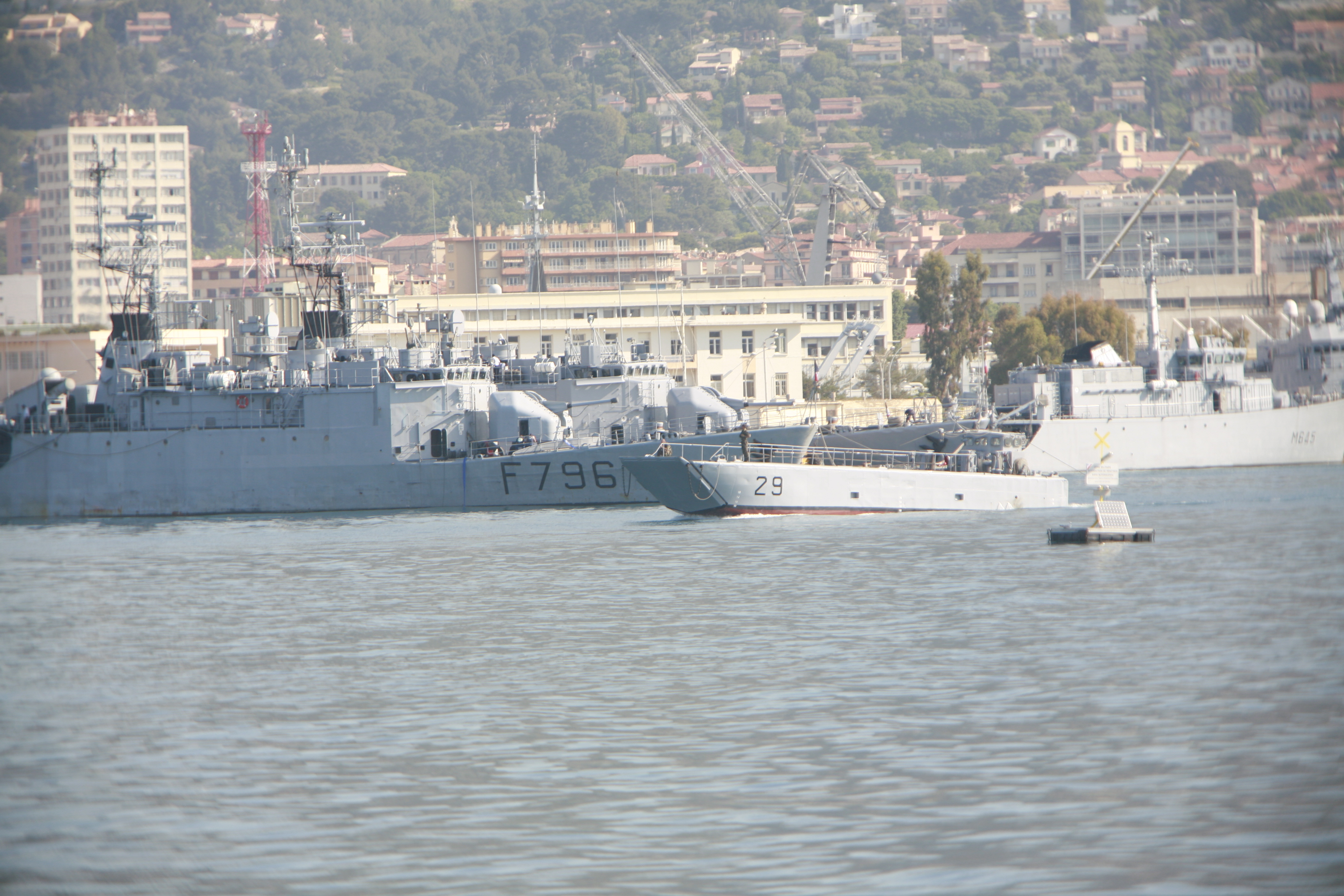 Chaland de transport de matériel ("equipment transport barge") in Toulon harbour